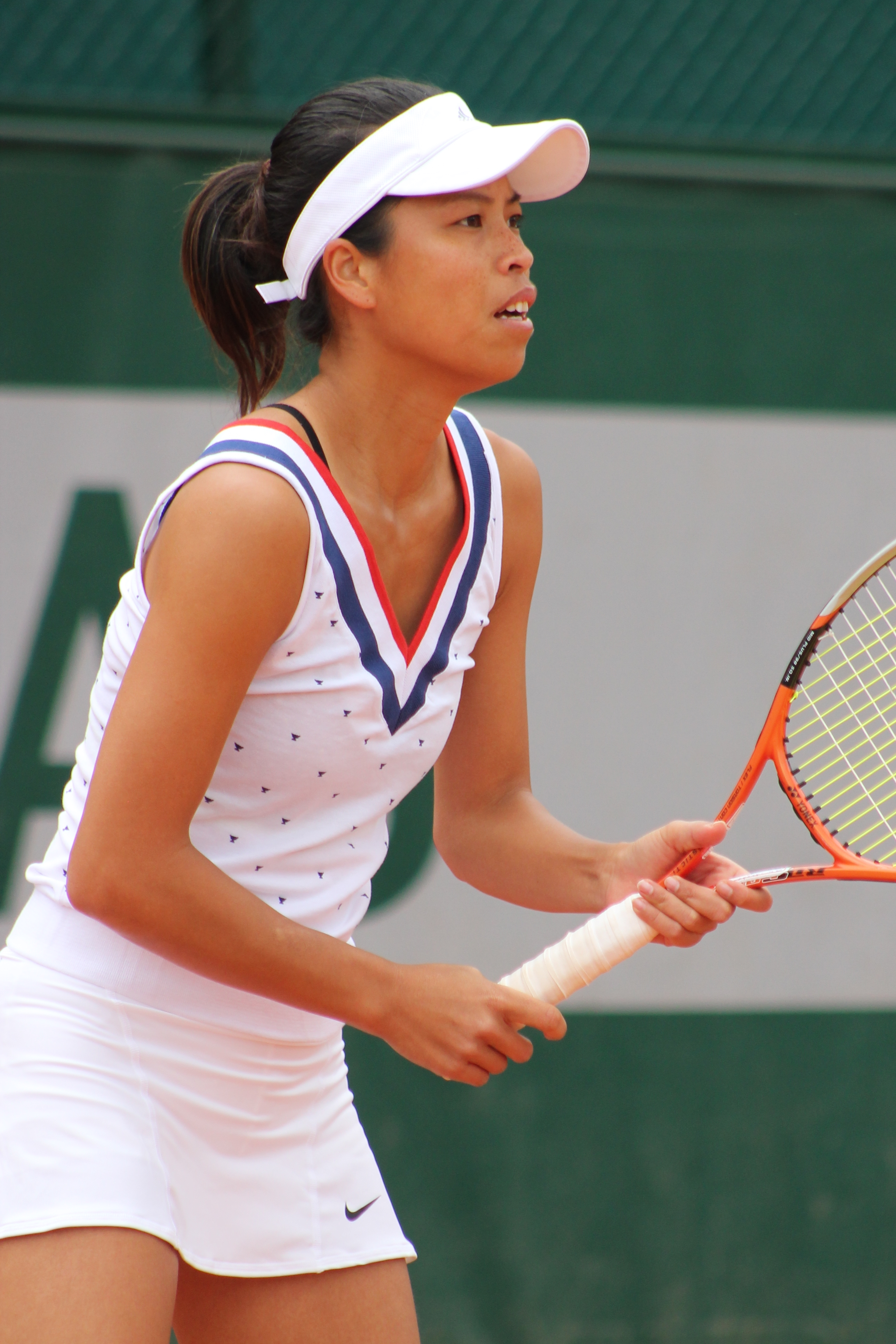 Hsieh RG14 (2)